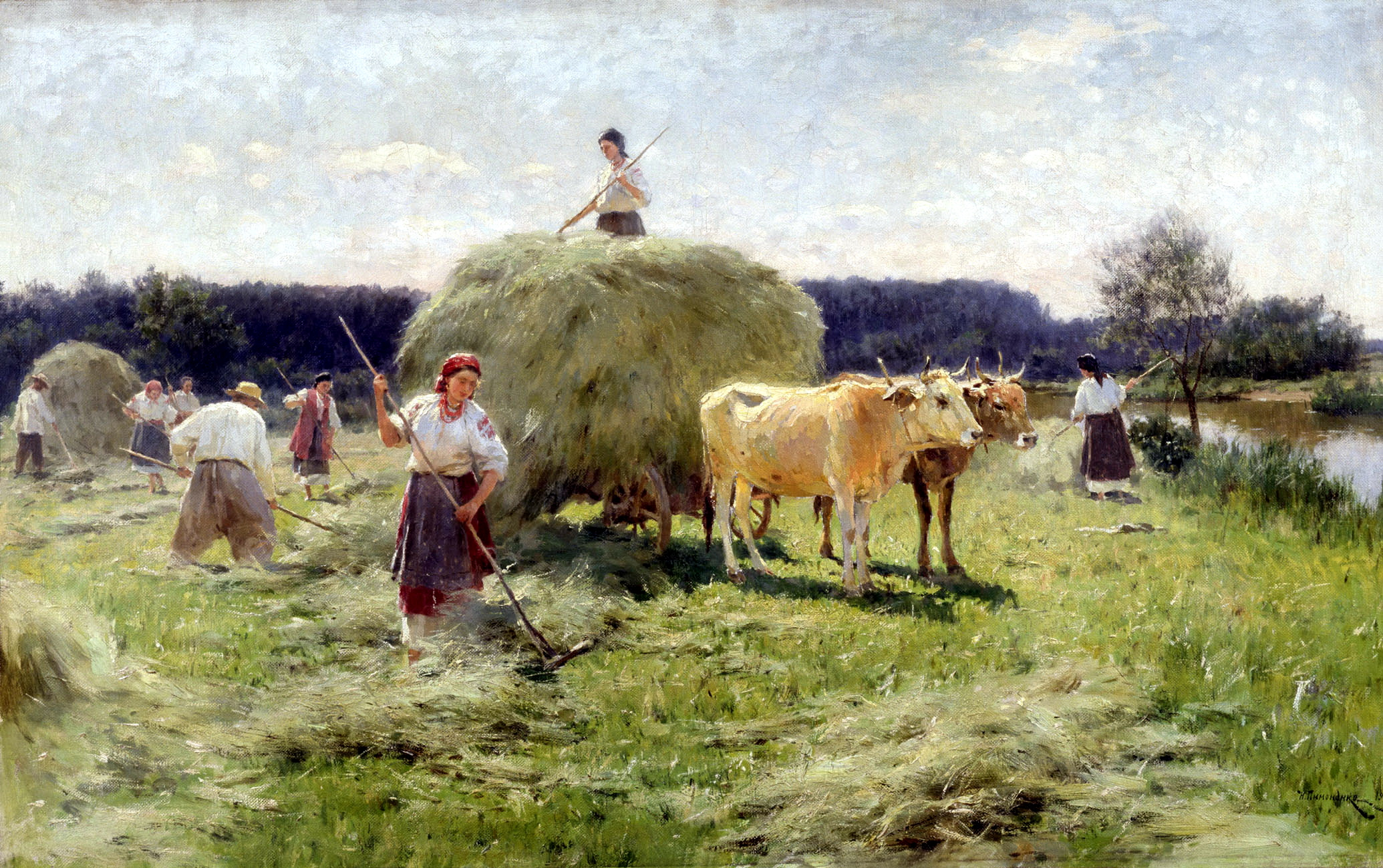 Haymaking